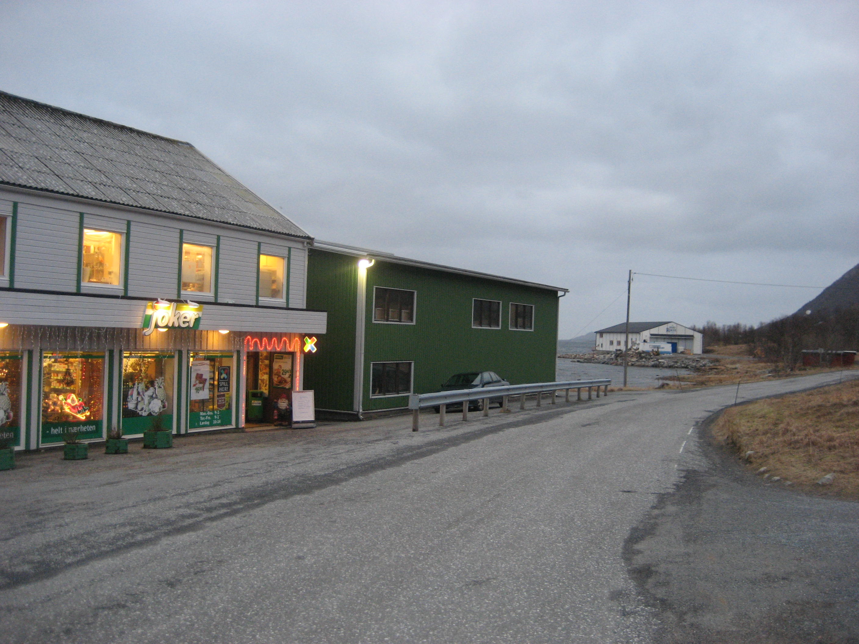 Butikken i Kvina, Lurøy: desember 2008